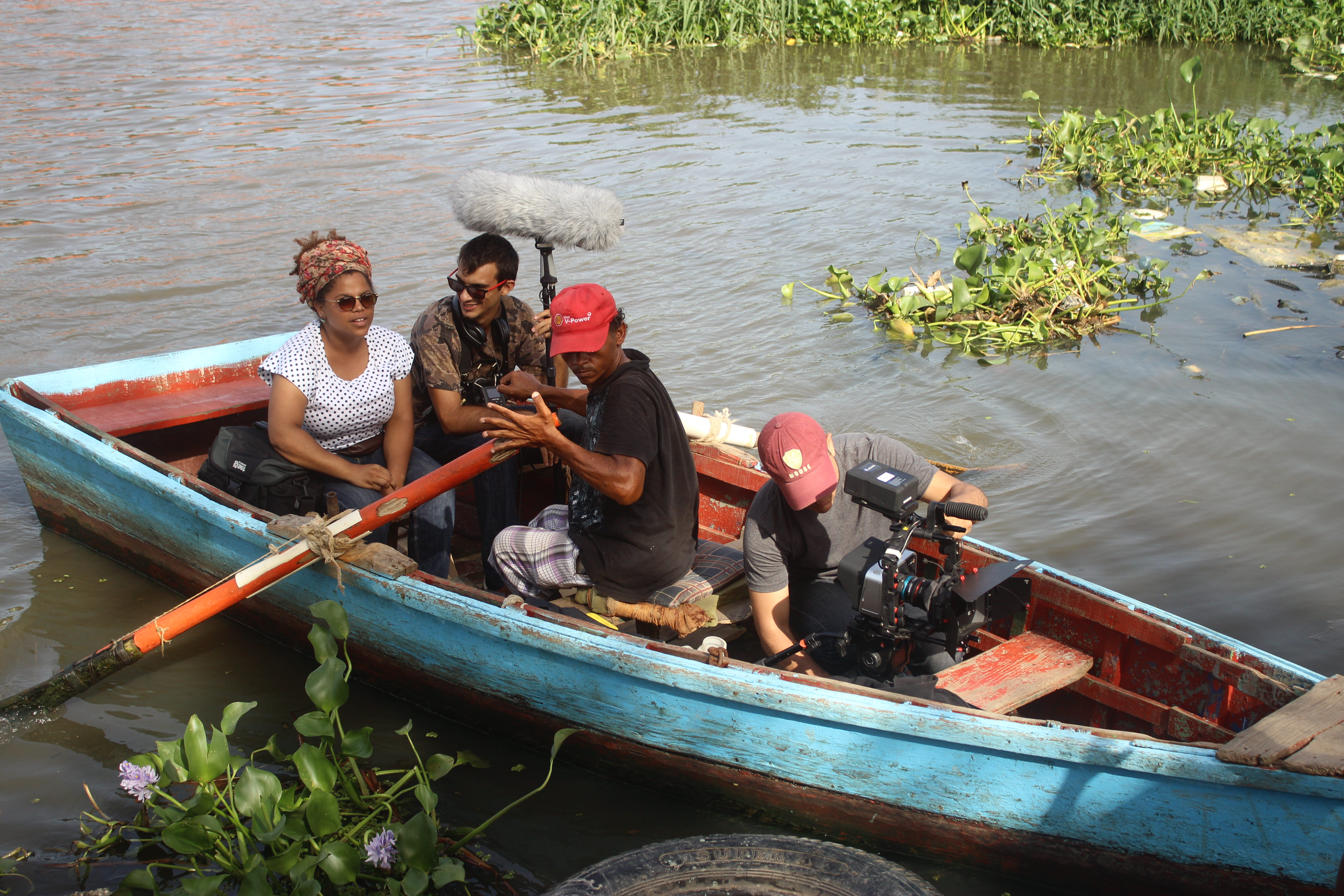 Momento de descanso, detrás de cámara del documental dominicano Caribbean Fantasy, dirigido por Johanné Gómez Terrero